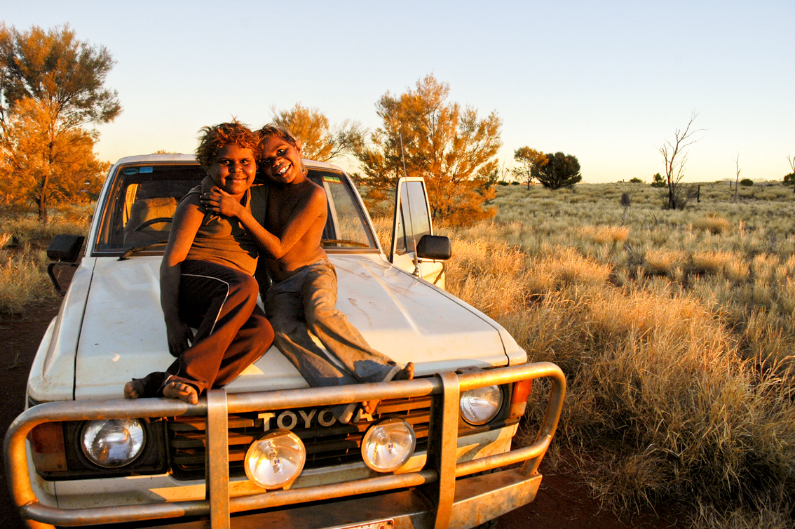 Ngaanyatjarra kids